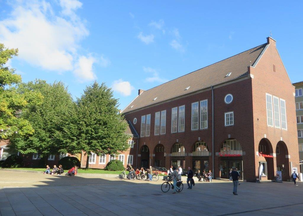 Das Gemeindehaus der Vereinigten Protestantischen Gemeinde zur Bürgermeister-Smidt-Gedächtniskirche, aus westlicher Richtung fotografiert mit dem im oberen Geschoss gelegenen Großen Gemeindesaal (früher auch wegen der dort stattfindenen „Meisterkonzerte“ „Kammermusiksaal“ genannt). Im Erdgeschoss war bis 2014 die Buchhandlung Thea Mügge, jetzt TUI-Reisebüro.